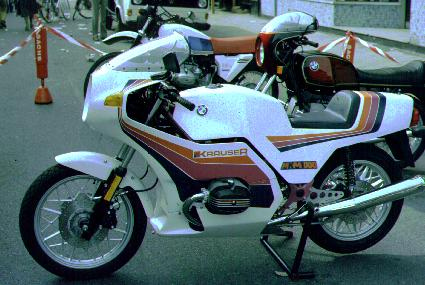 Abgebildetes Motorrad hat keinen Krausermotor, es sind Serienzylinderköpfe verbaut; die genaue bezeichnung war MK 100